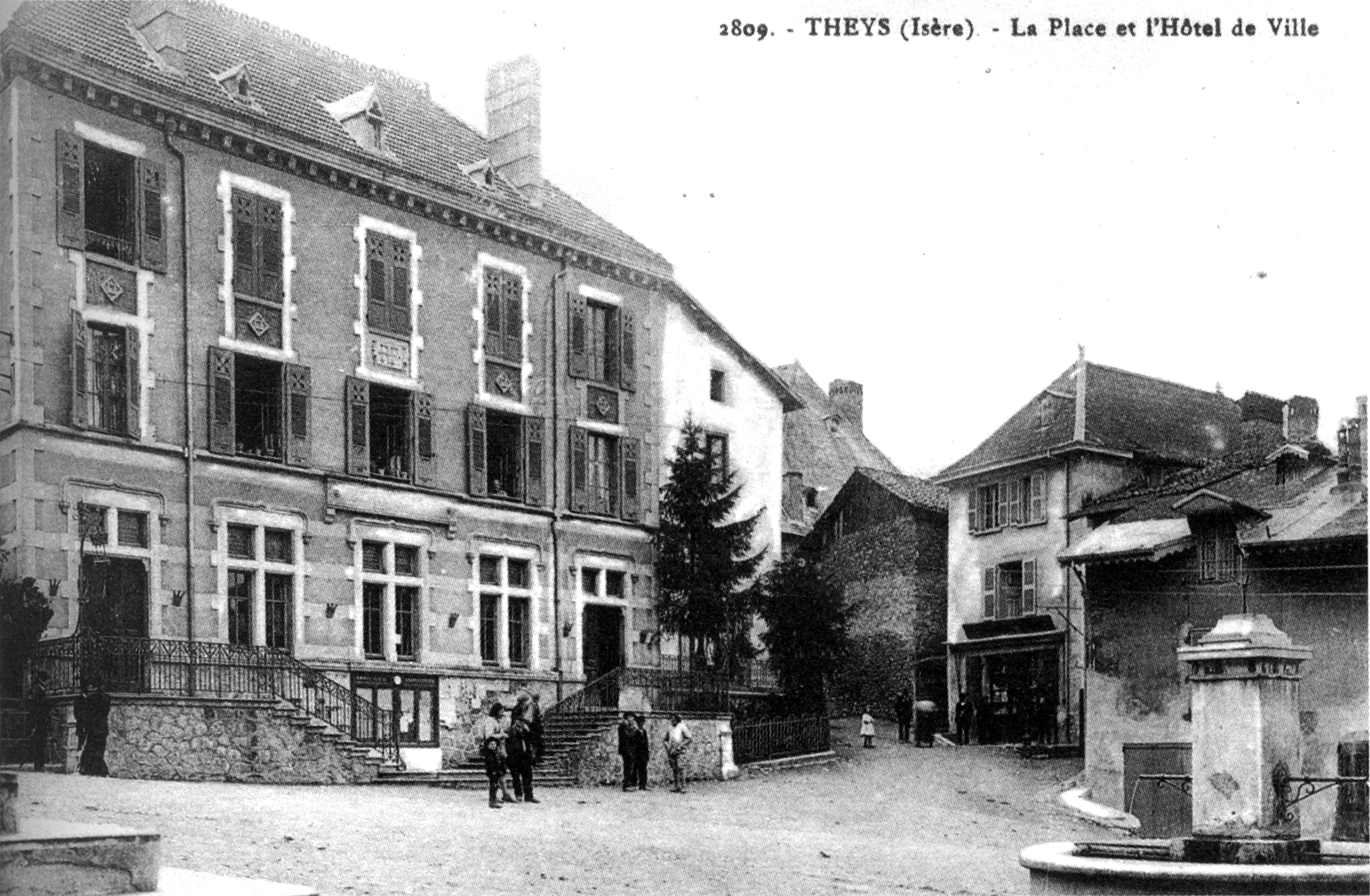 Theys, la place et l hotel de ville, en 1910